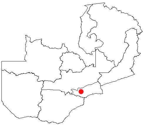 Lusaka, Zambia Location Map